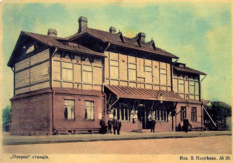 Станция Озерки Финляндской железной дороги